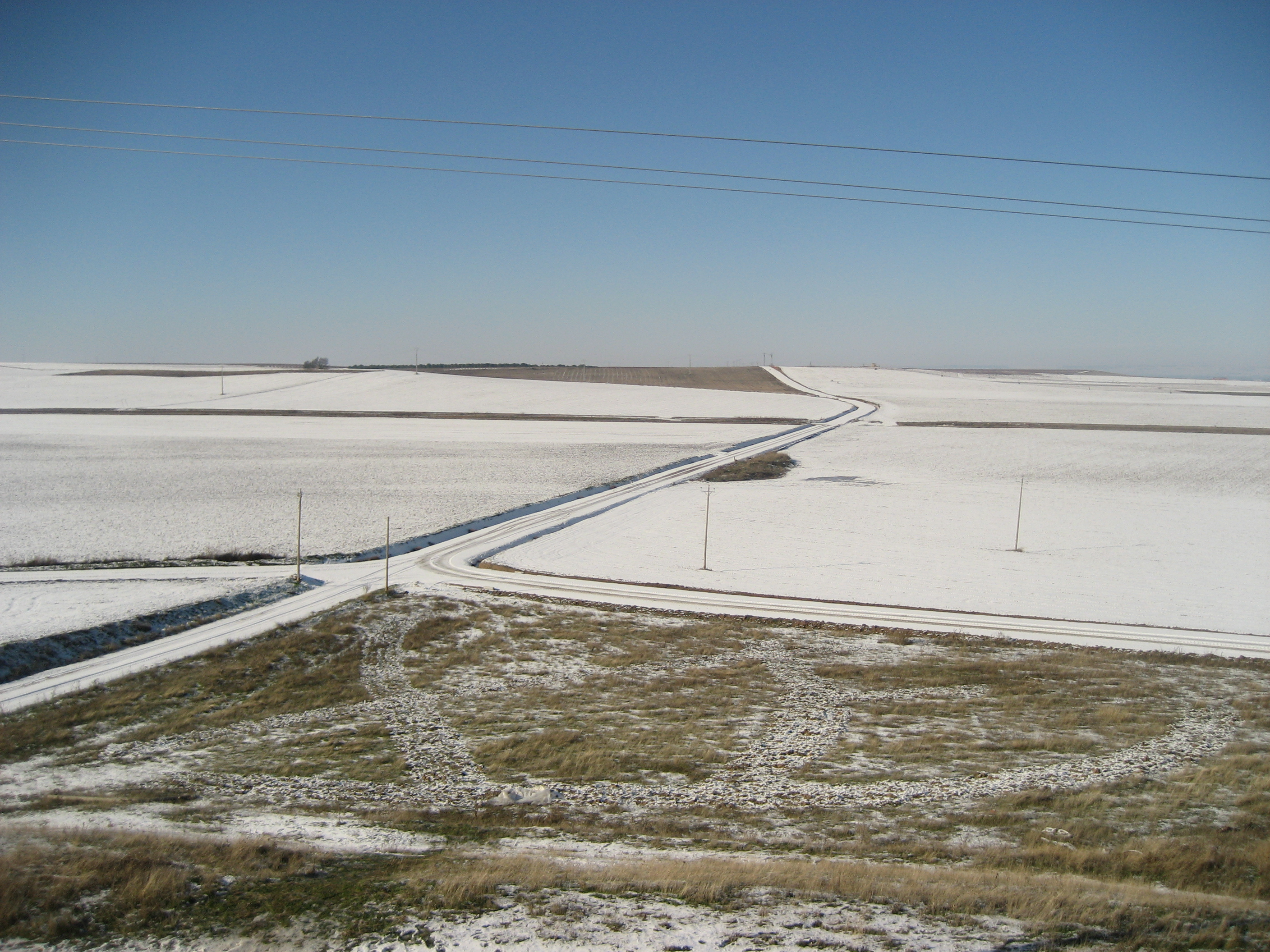 Vista invernal de los campos de Ventosa de la Cuesta, Valladolid (España).